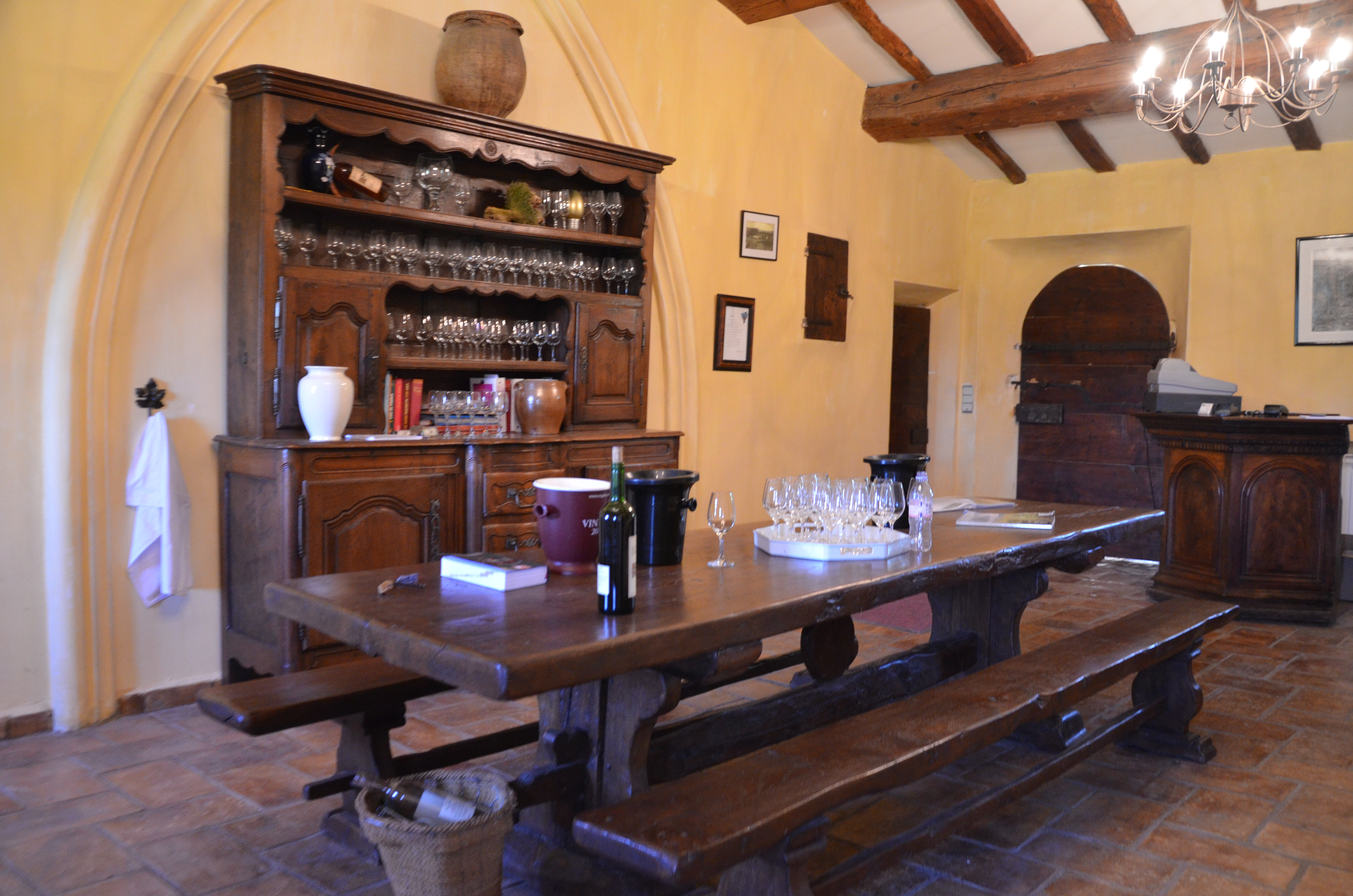 Salle de dégustation du domaine La Bégude